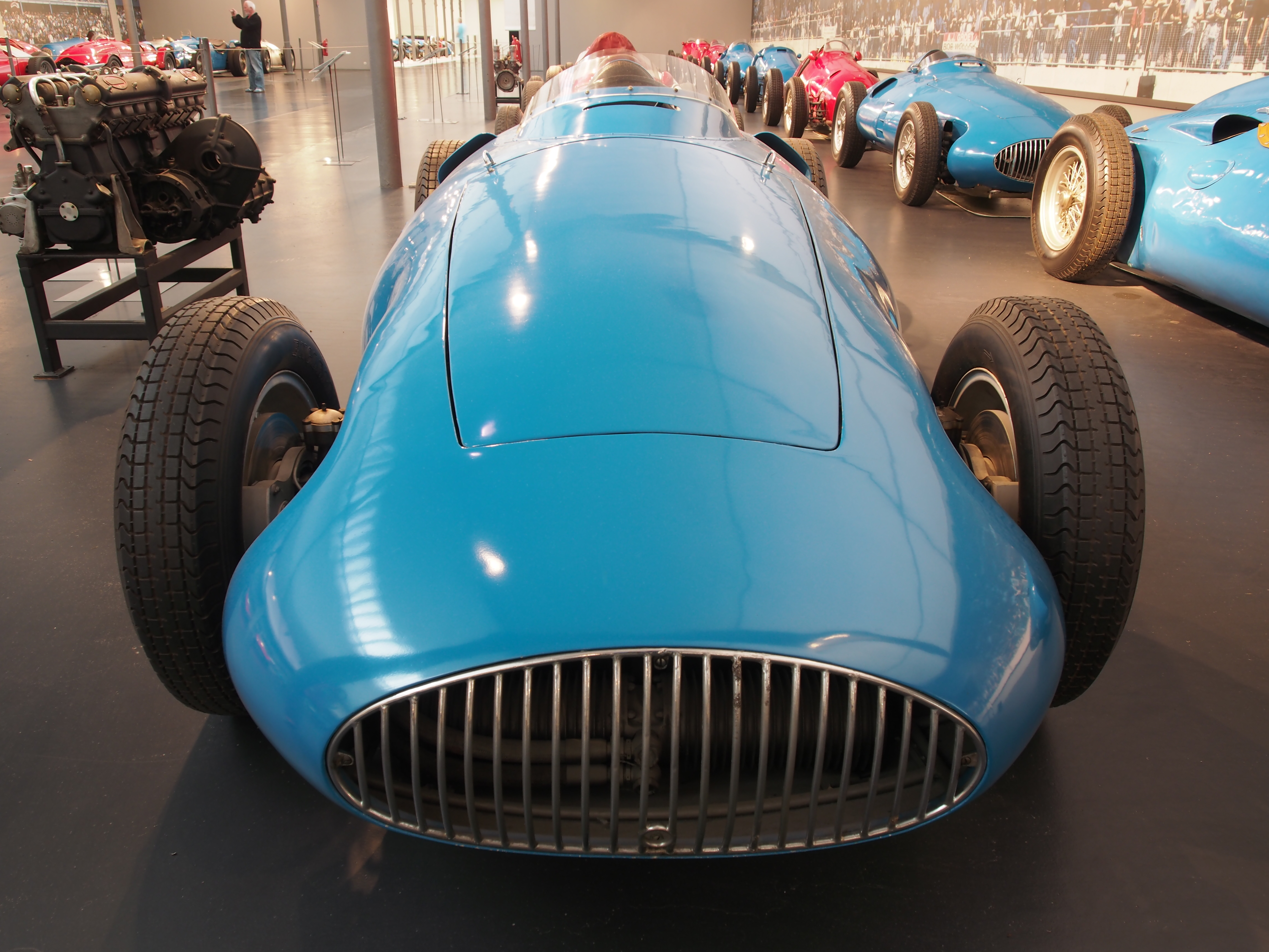 Photographed at the Cité de l’Automobile, Musée national de l’automobile, Collection Schlumpf, Mulhouse, France.